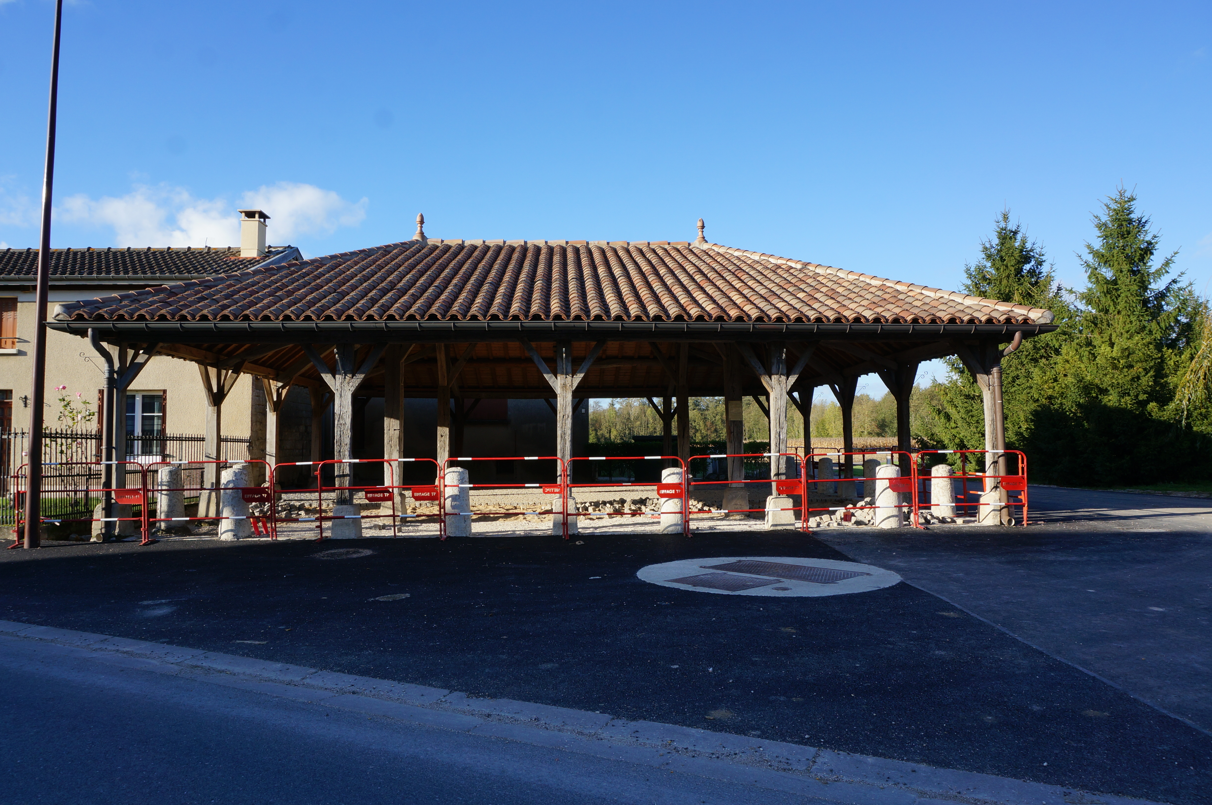 Vue de Songy.